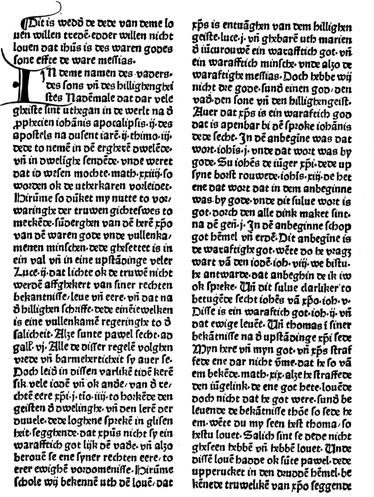 Dat bokeken van deme repe., De uthlegghinge ouer den louen. Lübeck: Drucker des Calderinus [= Johann Snell ?] , um 1481 (GW-Nummer GW13672), S. 198a; scan from Claussen, Bruno: Nicolaus Russ’ Boek van dren strenghen, der Calderinus-Drucker und Johann Snell. In: Nordisk tidskrift för bok- och biblioteksväsen 11 (1924), S. 117–128